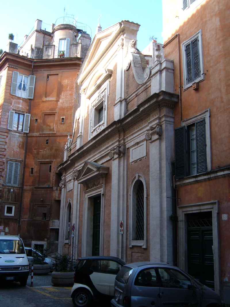 Chiesa di S. Tommaso in Parione, a Roma, nel rione Parione.